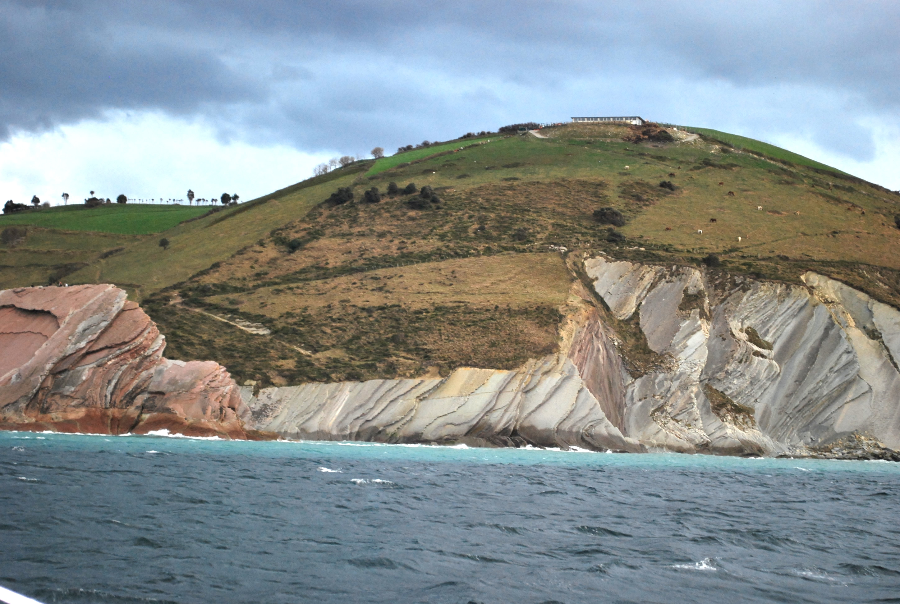 Flysch à Zumaia (Guipuscoa).